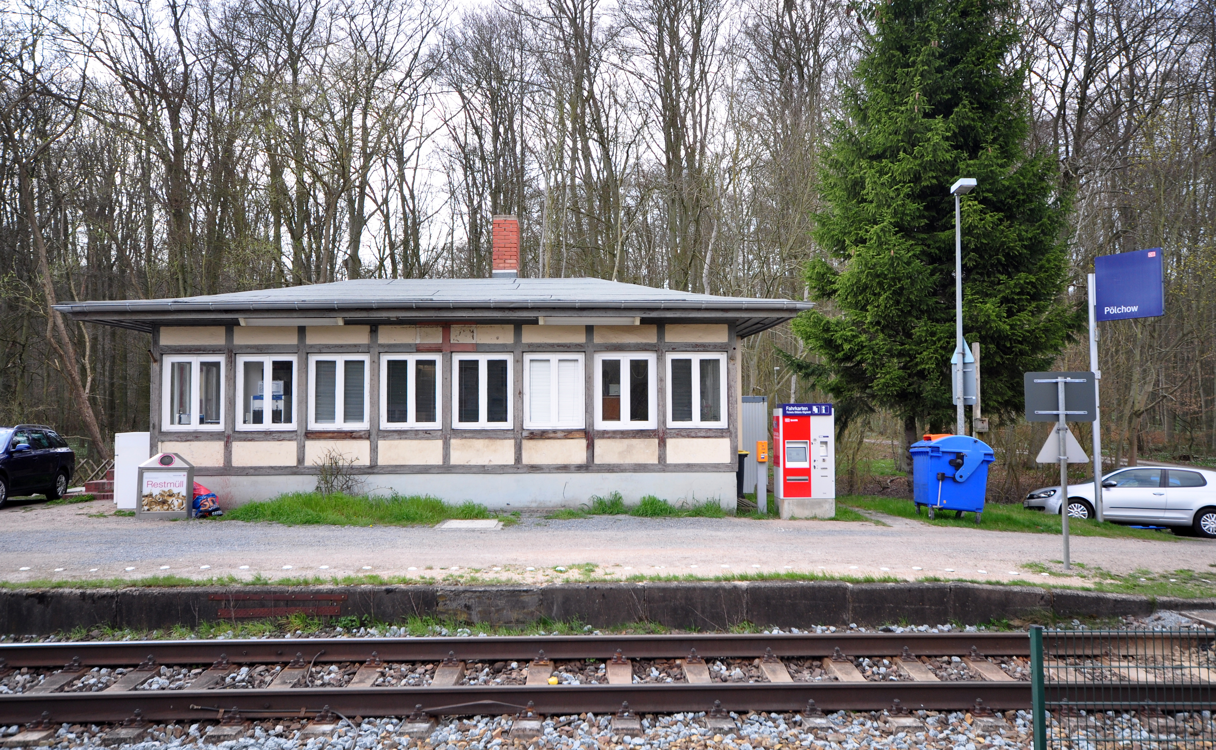 railway station, Pölchow